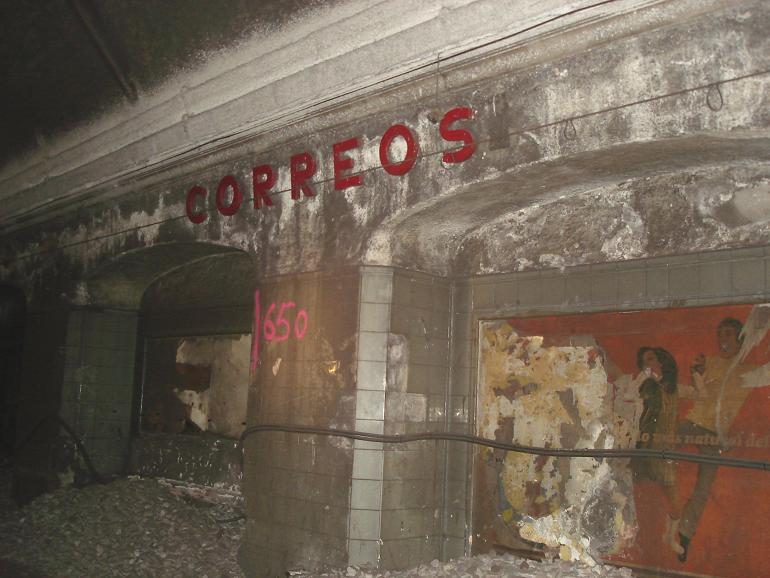 Estación fantasma del Metro de Barcelona (Correos/Correus)